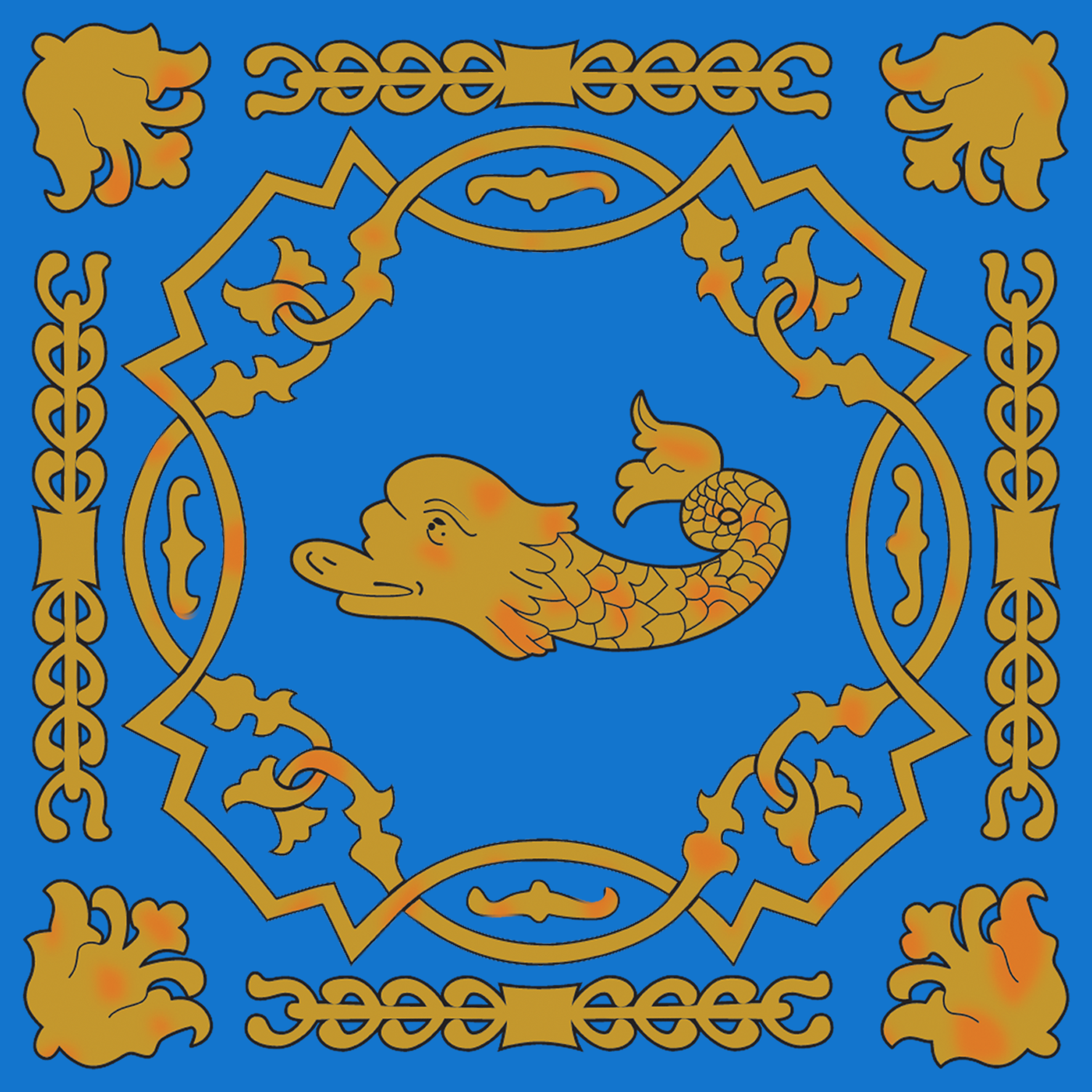 Bandiera Delfini